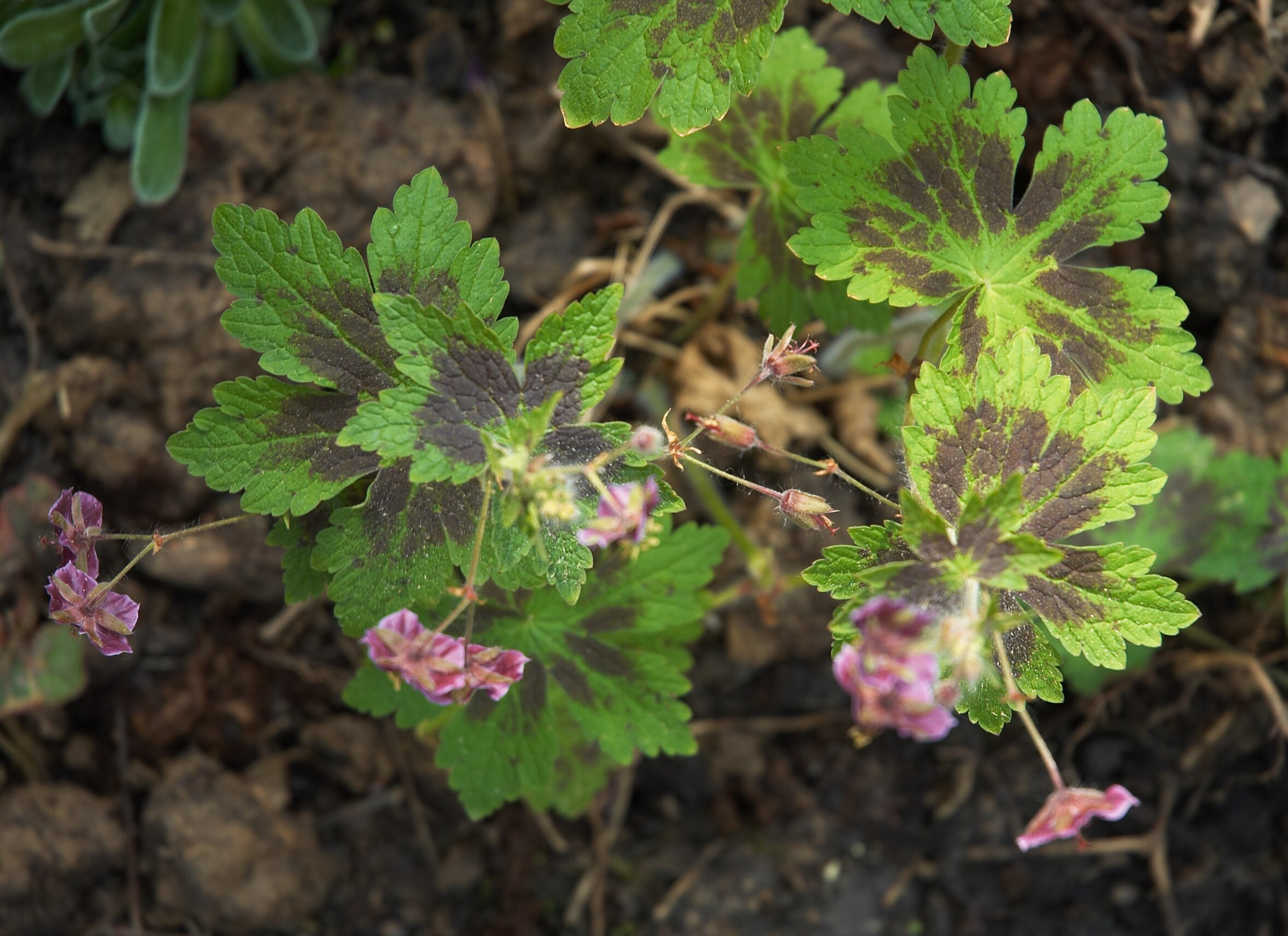 Geranium phaeum 'Samobor'